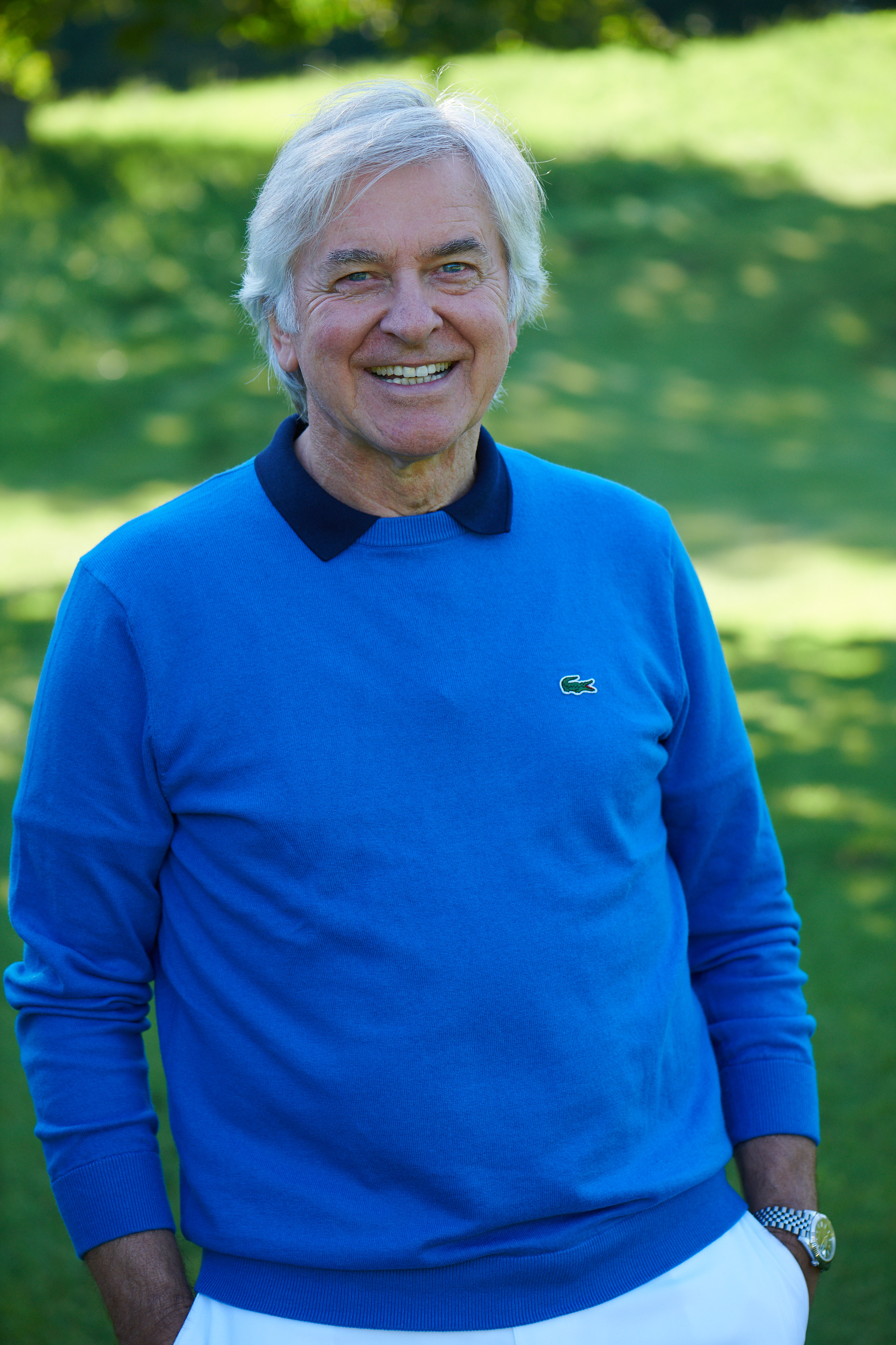 Bernd H. Litti 2019 Starnberg